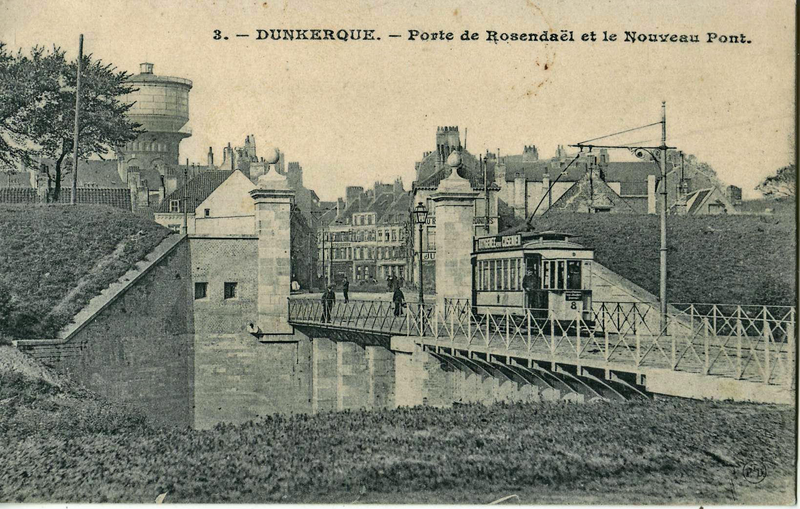 Carte postale éditée par PtD, n°3 : DUNKERQUE - Porte de Rosendaël et le Nouveau Pont;Vue de la motrice n°8 du tramway de Dunkerque